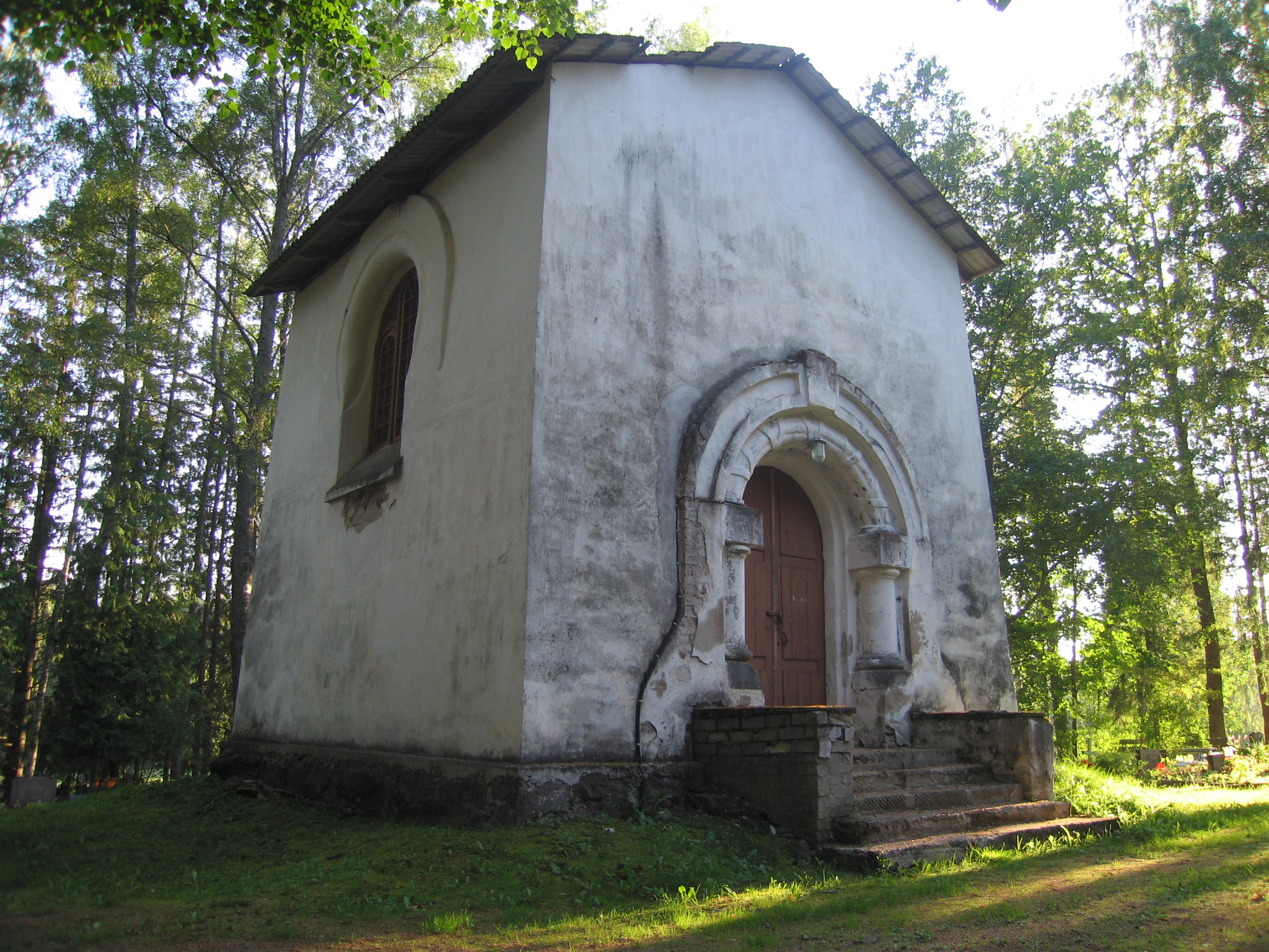 Kabel kalmistul.Foto: Robert Treufeldt, 2. august 2014